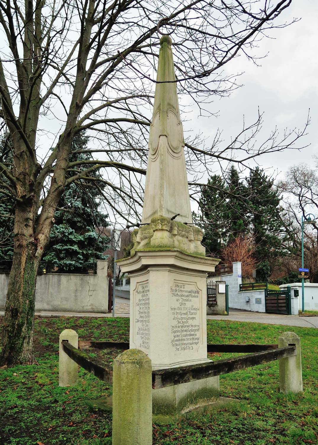 Maria Theresien-Obelisk in Mannersdorf am Leithagebirge, Niederösterreich, Österreich